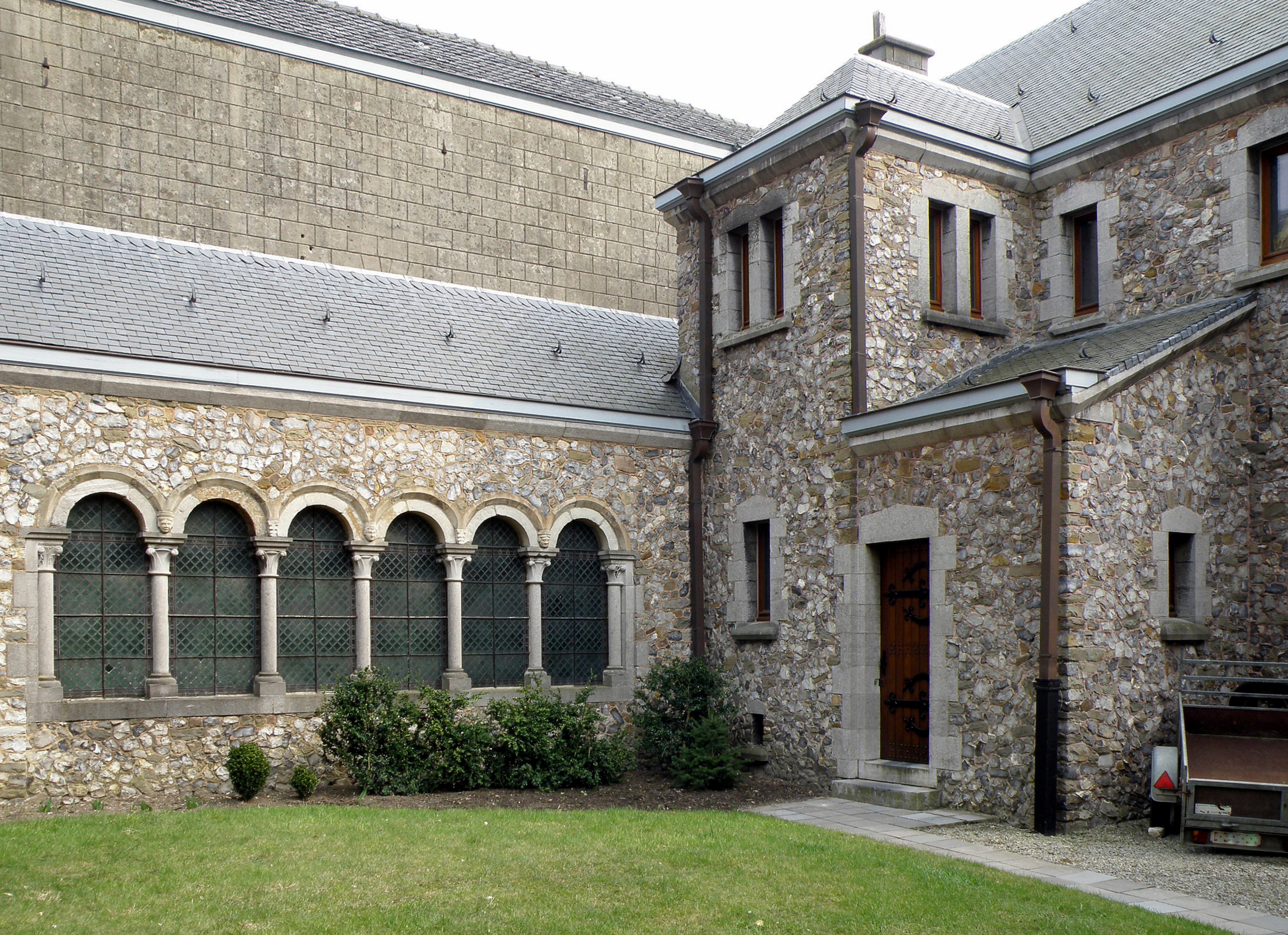 Borgloon (prov. Limburg, België). Sint-Odolphuskerk, kloostergang.